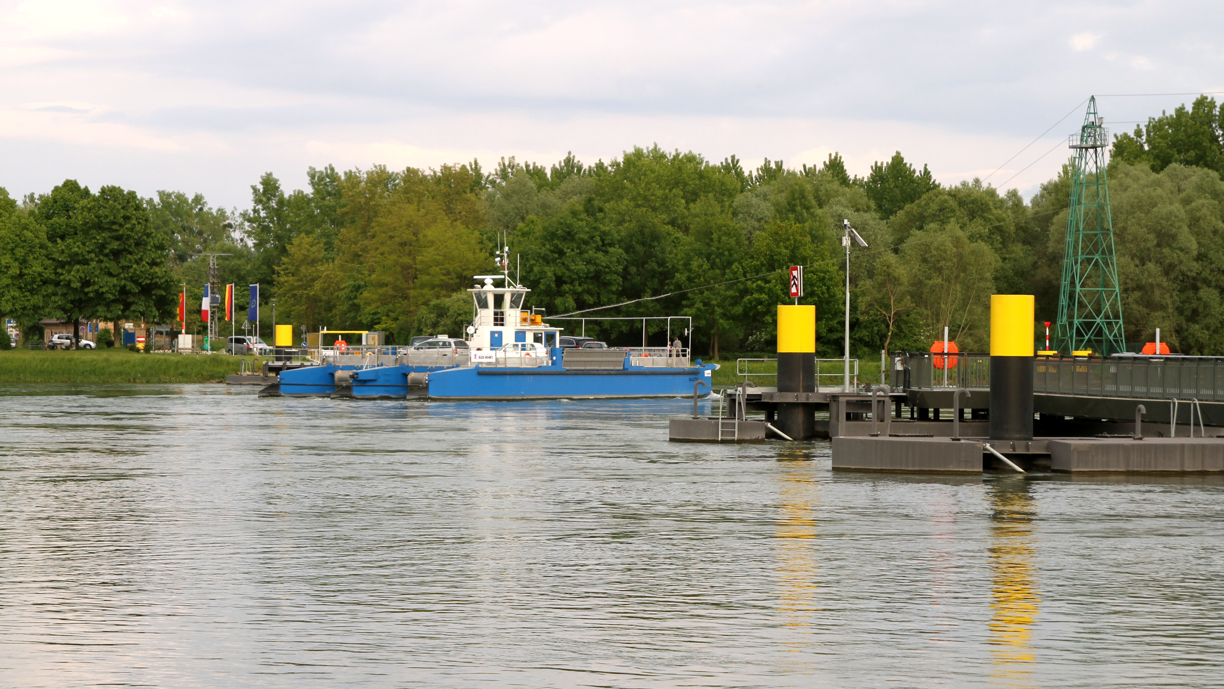 Die Rheinfähre Seltz-Plittersdorf aus Sicht der französischen Seite.